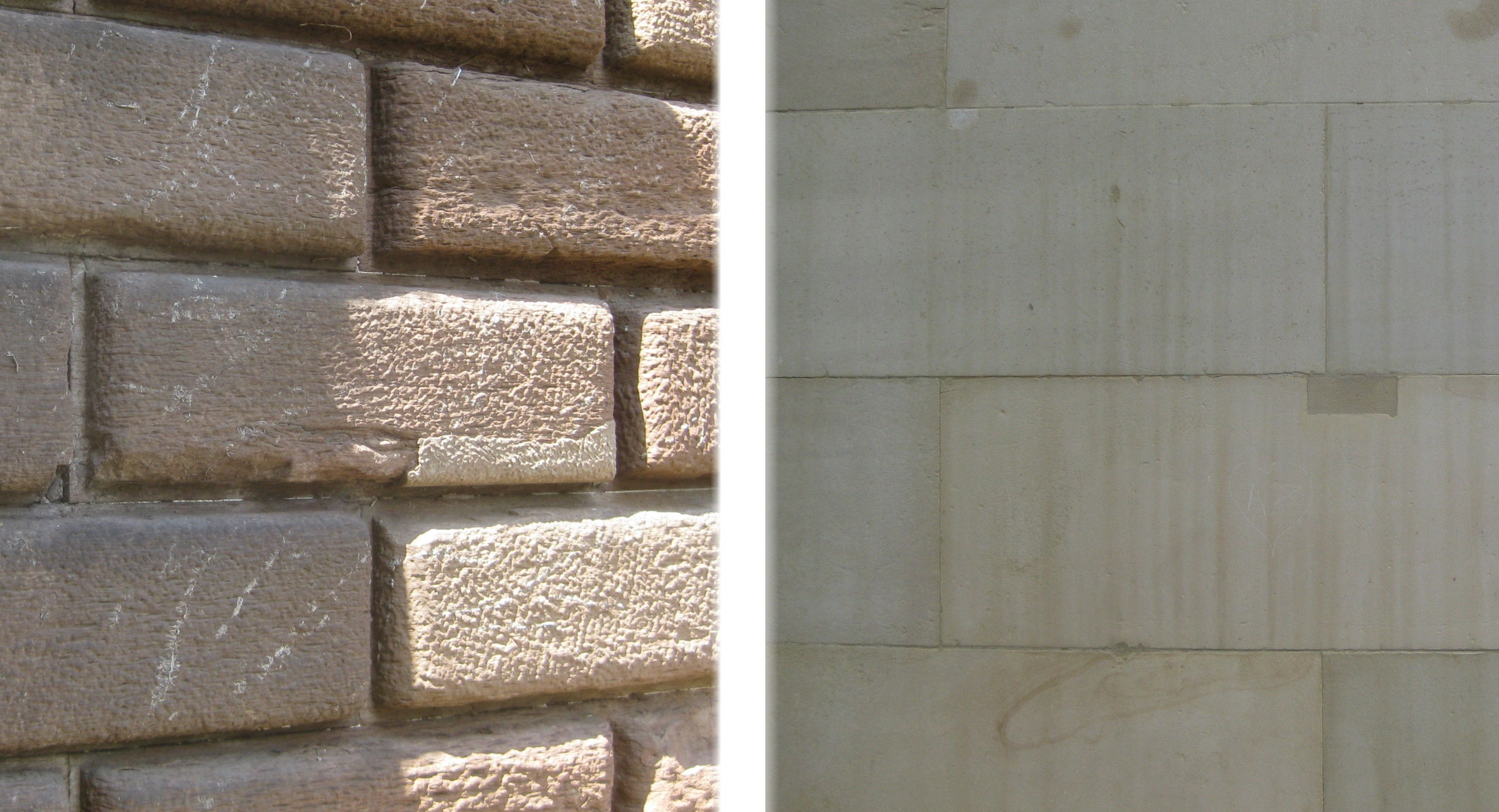 Stuttgart, Villa Berg, Mauerwerk, links: Untergeschoss, rechts Obergeschosse.